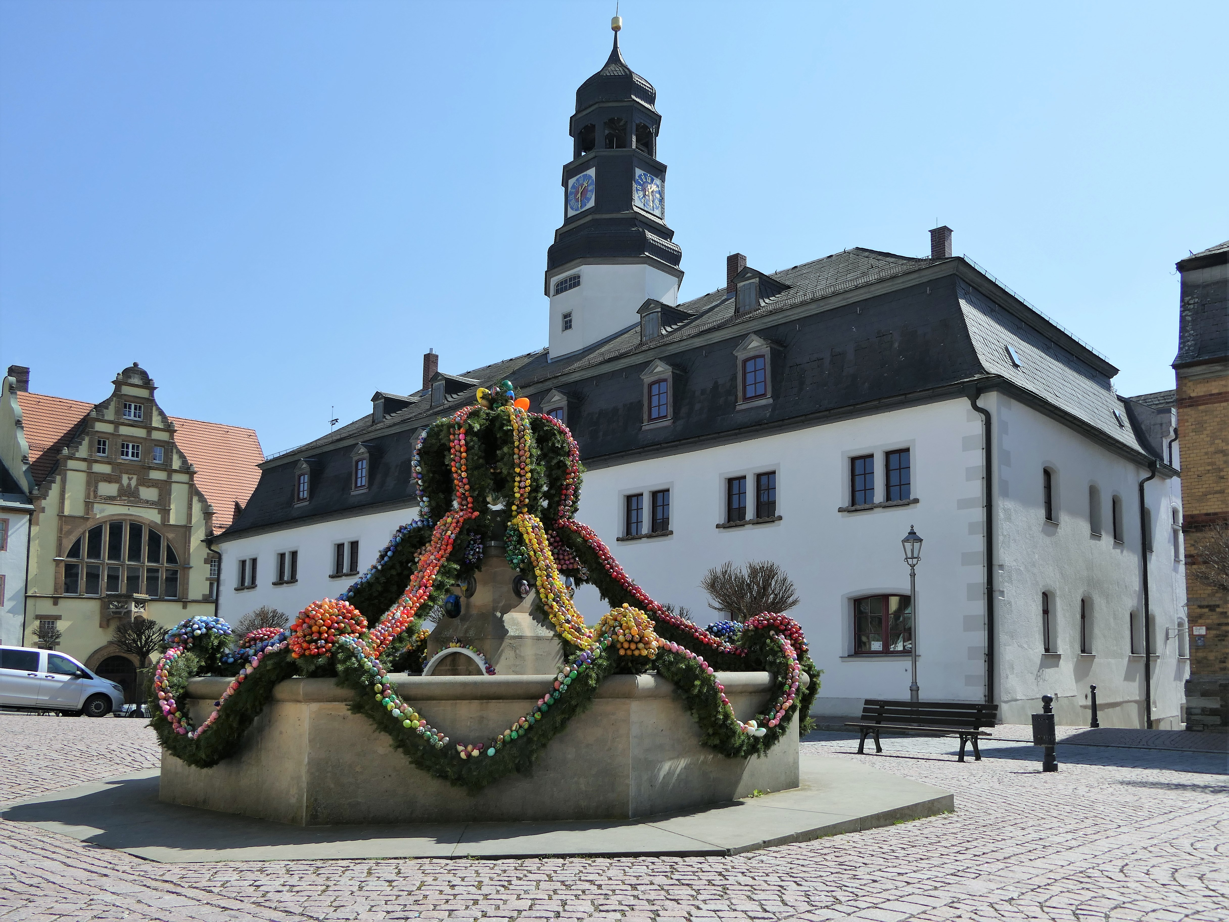 Rathaus in Auma (Thüringen) mit Osterbrunnen, 2019